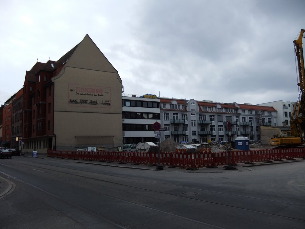 Blick auf das frühere Werksgelände der Firma Fleischmann am Kirchenweg 13 in Nürnberg. Die Fabrik wurde Anfang des 20. Jahrhunderts von der Firm Doll & Co erbaut und war von 1938 bis 2008 Produktionsstätte und Firmensitz von Fleischmann. Links das frühere Verwaltungsgebäude mit der Fassadenwerbung, rechts hinten die für Wohnzwecke umgebauten historischen Fabrikgebäude. Inzwischen (November 2013) ist das Grundstück im Vordergrund mit Wohnhaus-Neubauten bebaut.